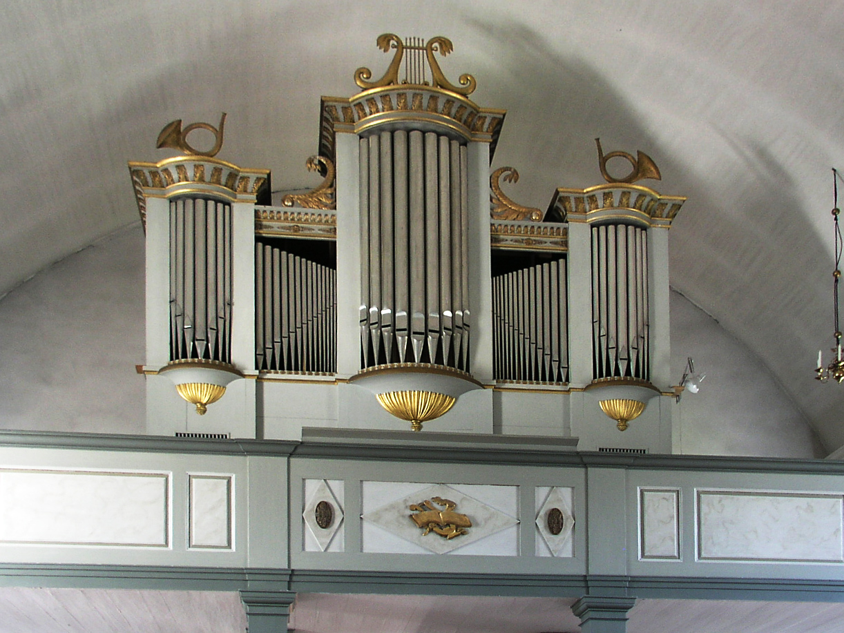 Västra Tollstads kyrka, Ödeshög, Linköpings stift, Östergötland, Sverige. Orgel.